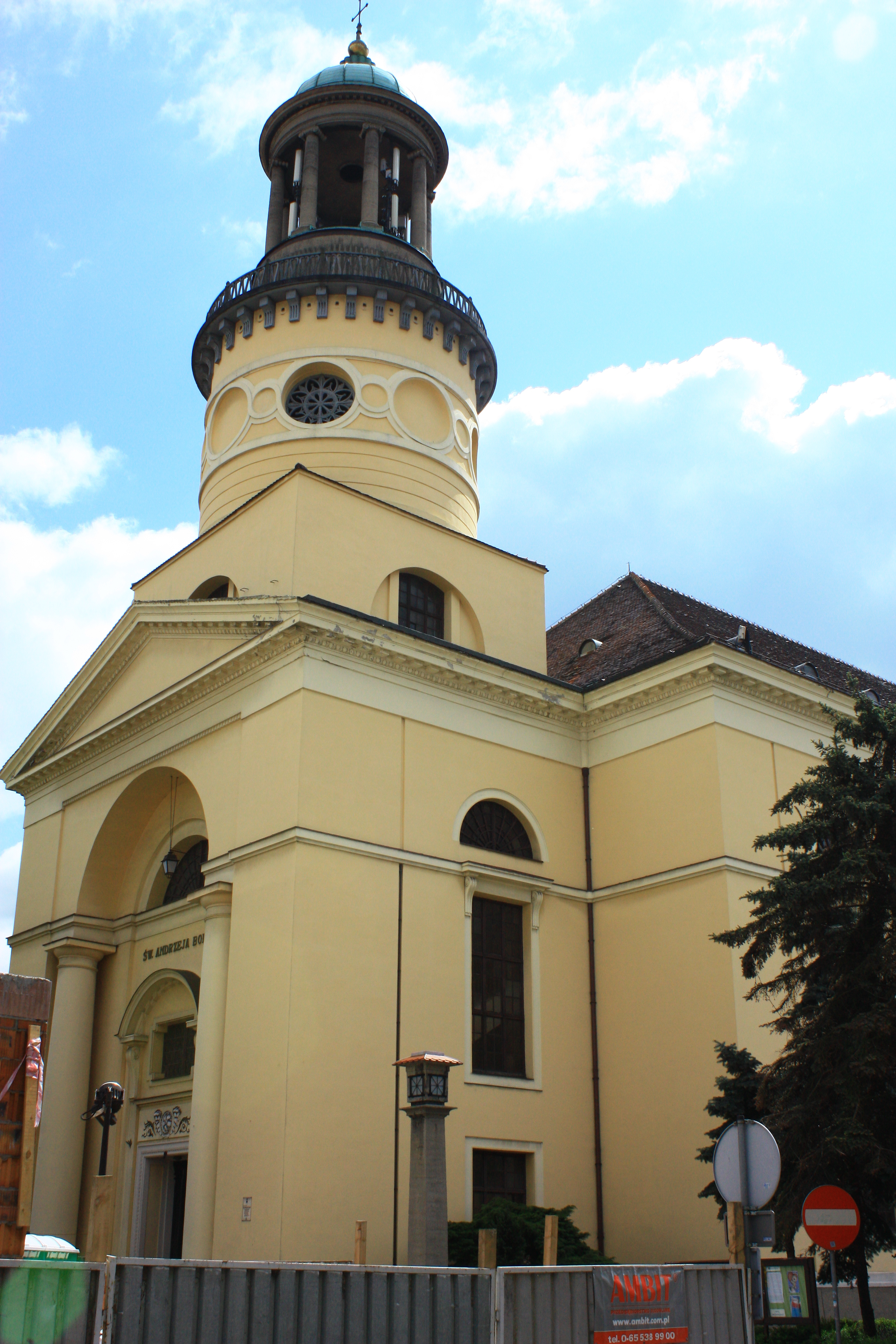 Rawicz, kościół ewangelicki, ob. rzym.-kat. p.w. św. Andrzeja Boboli, 1808, 1915